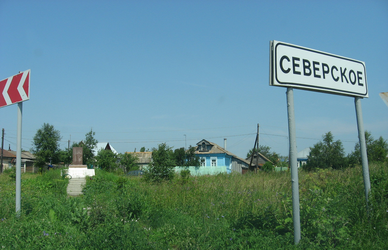 Знак на въезде в село Северское Коломенского района